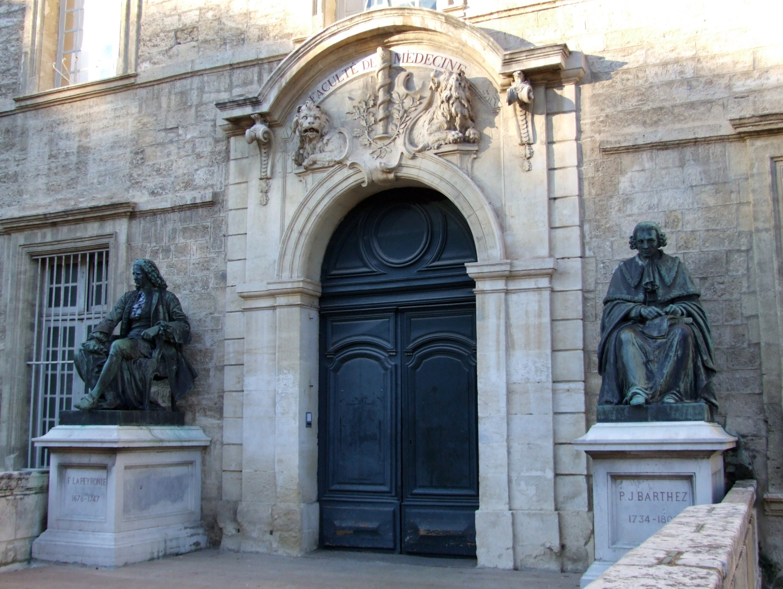 Faculté de Médecine, Montpellier, Hérault, FRANCE